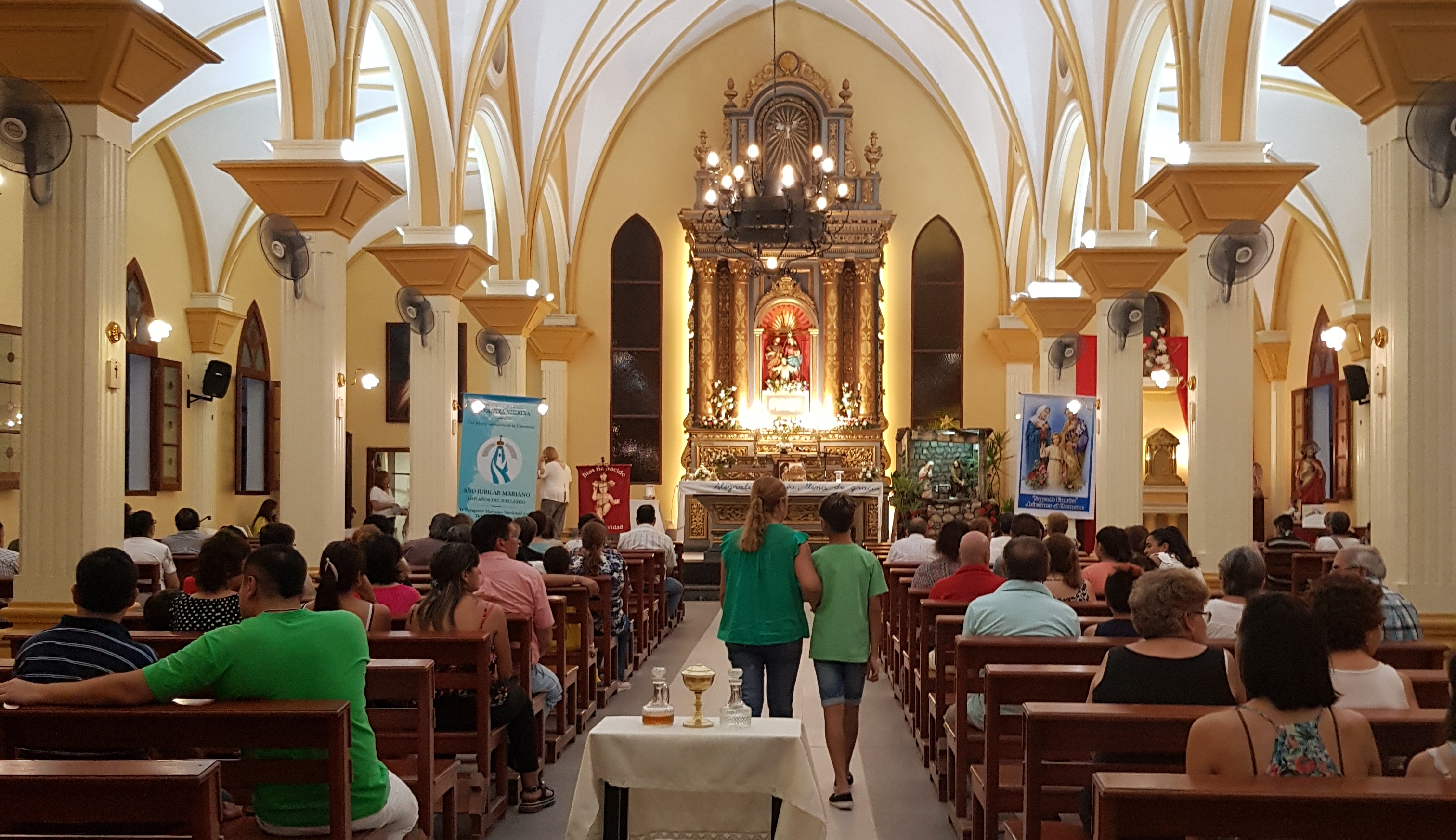 Misa católica en la iglesia de la Sagrada Familia en la ciudad de Alderetes, provincia de Tucumán (Argentina).